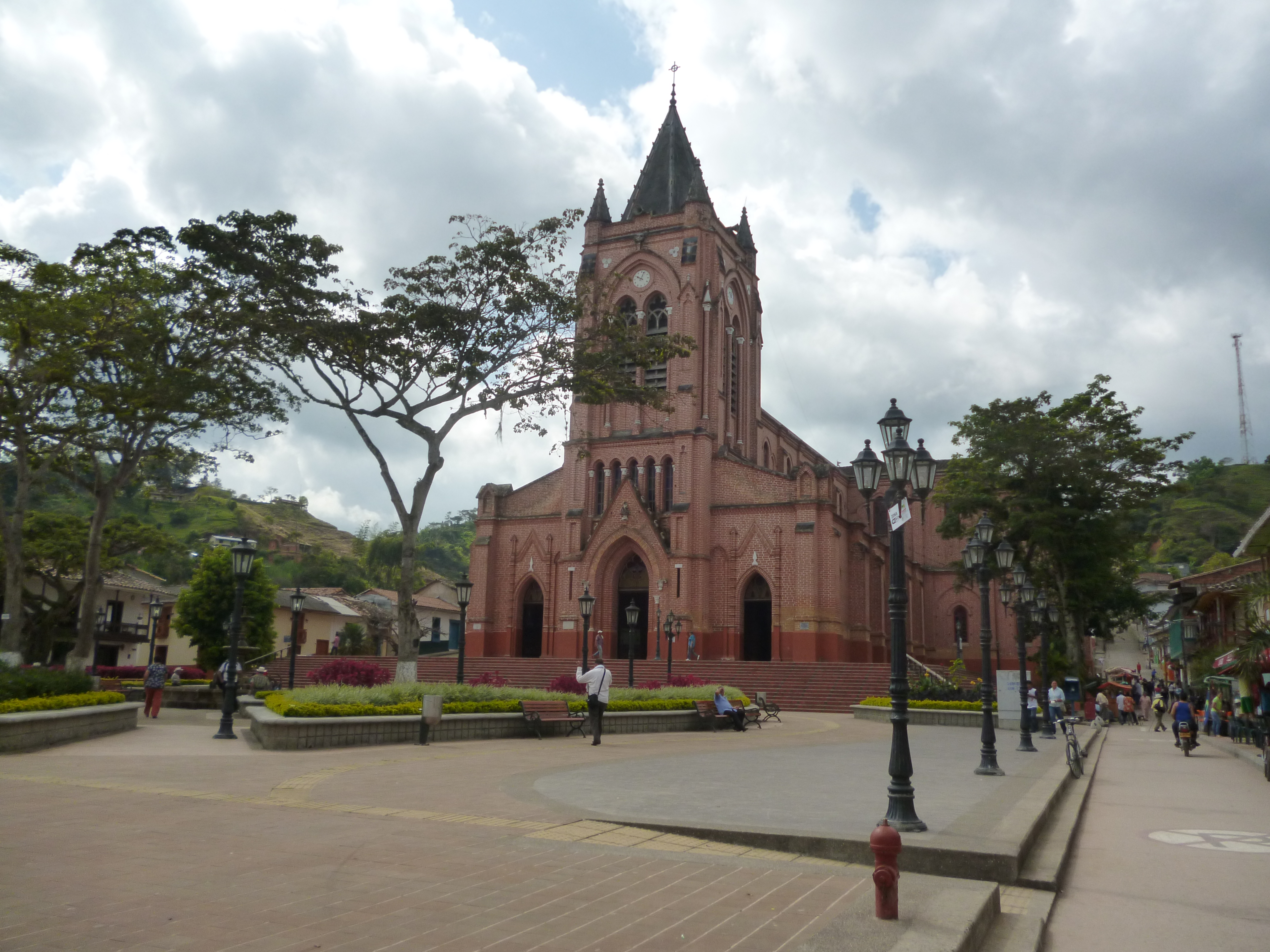 Parque principal del municipio de San Roque